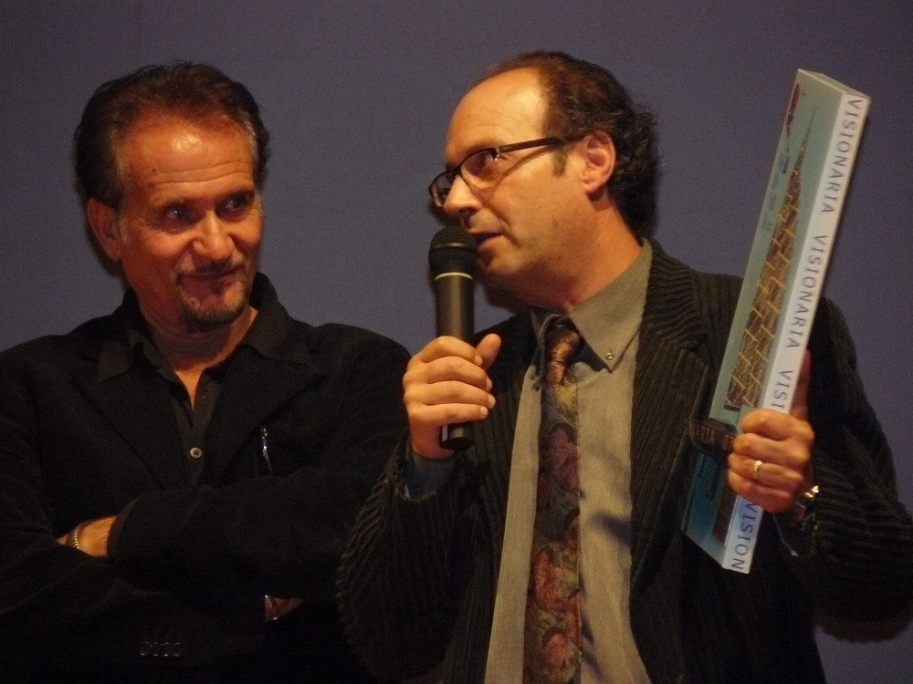 Visionaria 2007. Ugo Chiti e Pino Modica sul palco